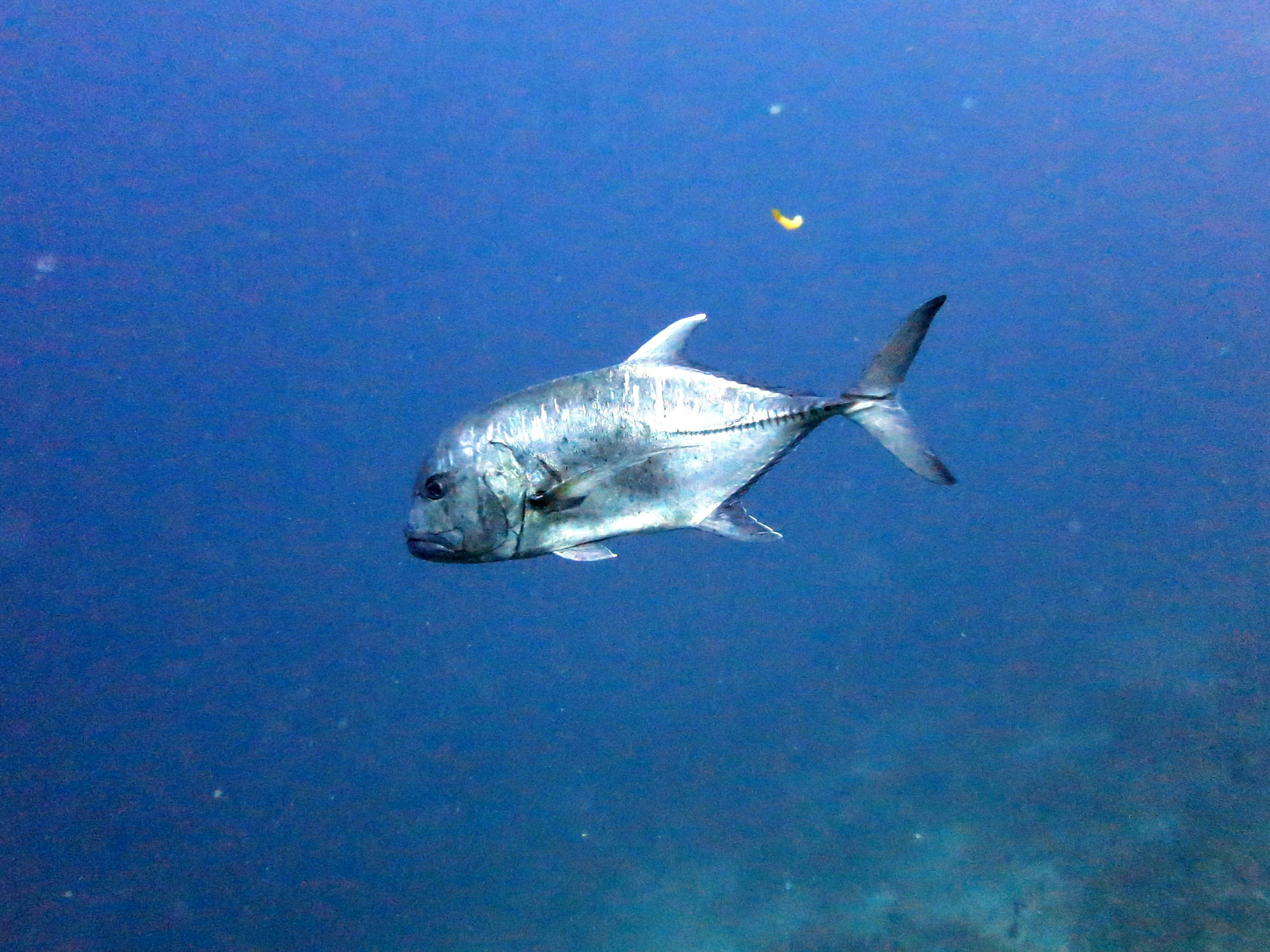 Une carangue à grosse tête à Voavah aux Maldives (atoll de Baa).